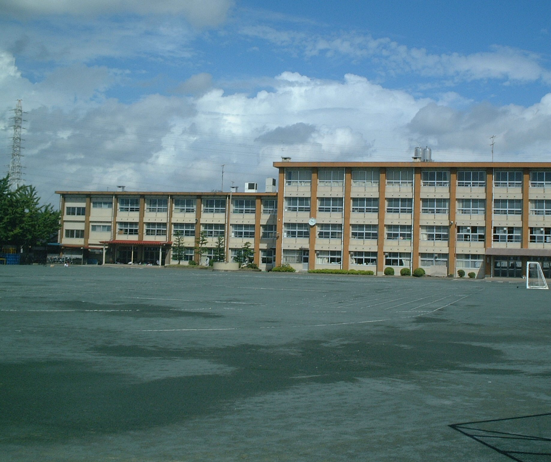 一宮市立瀬部小学校